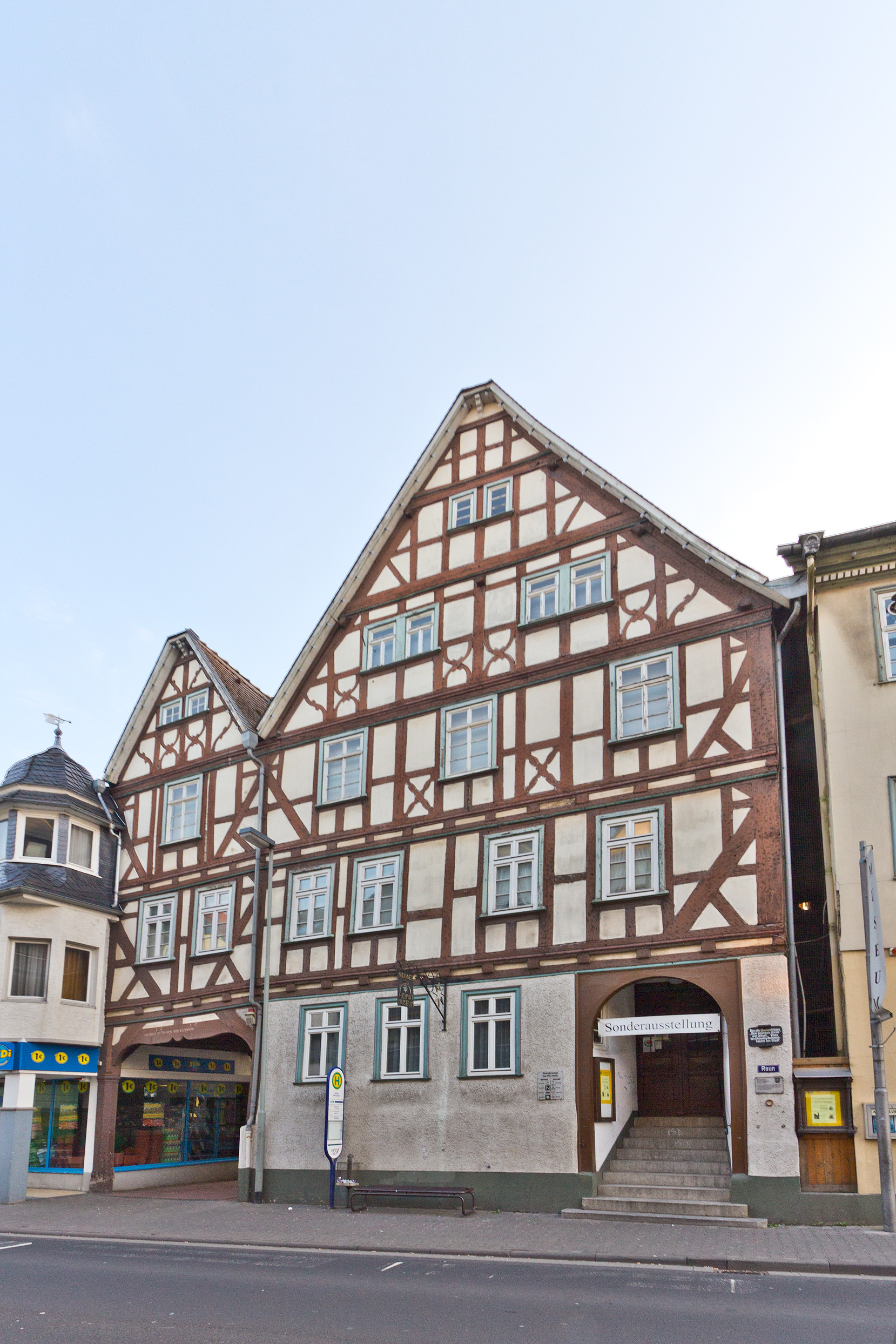 Ehemaliges Stadtwirtshaus „Zum Goldenen Stern“ in Nidda (Wetteraukreis), 1632 erbaut. Großes, zweigeschossiges Fachwerkhaus, aus zwei Bauteilen bestehend, mit starker Wirkung im Platzbild. Der rechte, größere Teil mit großem karniesumrahmten Rundbogenportal, darüber zwei Geschosse mit reichen Eckstreben und Feuerböcken in den Brüstungen. Giebel mehrfach übersetzt mit genasten Feuerböcken. Der linke Bauteil, ebenfalls giebelständig, überspannt die Hofdurchfahrt durch einen eleganten, von polygonalen Säulen mit doppeltem Eselsrücken getragenen Torbau: dort Datum „1632 HEINRICH OTTERBEIN DER MEISTER WAR“, darüber ähnliches Fachwerk wie am benachbarten Bau. Innerhalb der oberessischen Fachwerkgeschichte einer der bedeutenden, kunsthistorisch wertvollen Bauten von Meiser Otterbein aus Langd in vorzüglicher Erhaltung mit reicher Fachwerkfiguration. Kulturdenkmal wegen seiner künstlerischen, geschichtlichen und städtebaulichen Bedeutung. (Ab 1938 Wohnhaus und ab 1970 als Rathaus der Stadt Nidda mitgenutzt. Seit 1984 Heimatmuseum.))